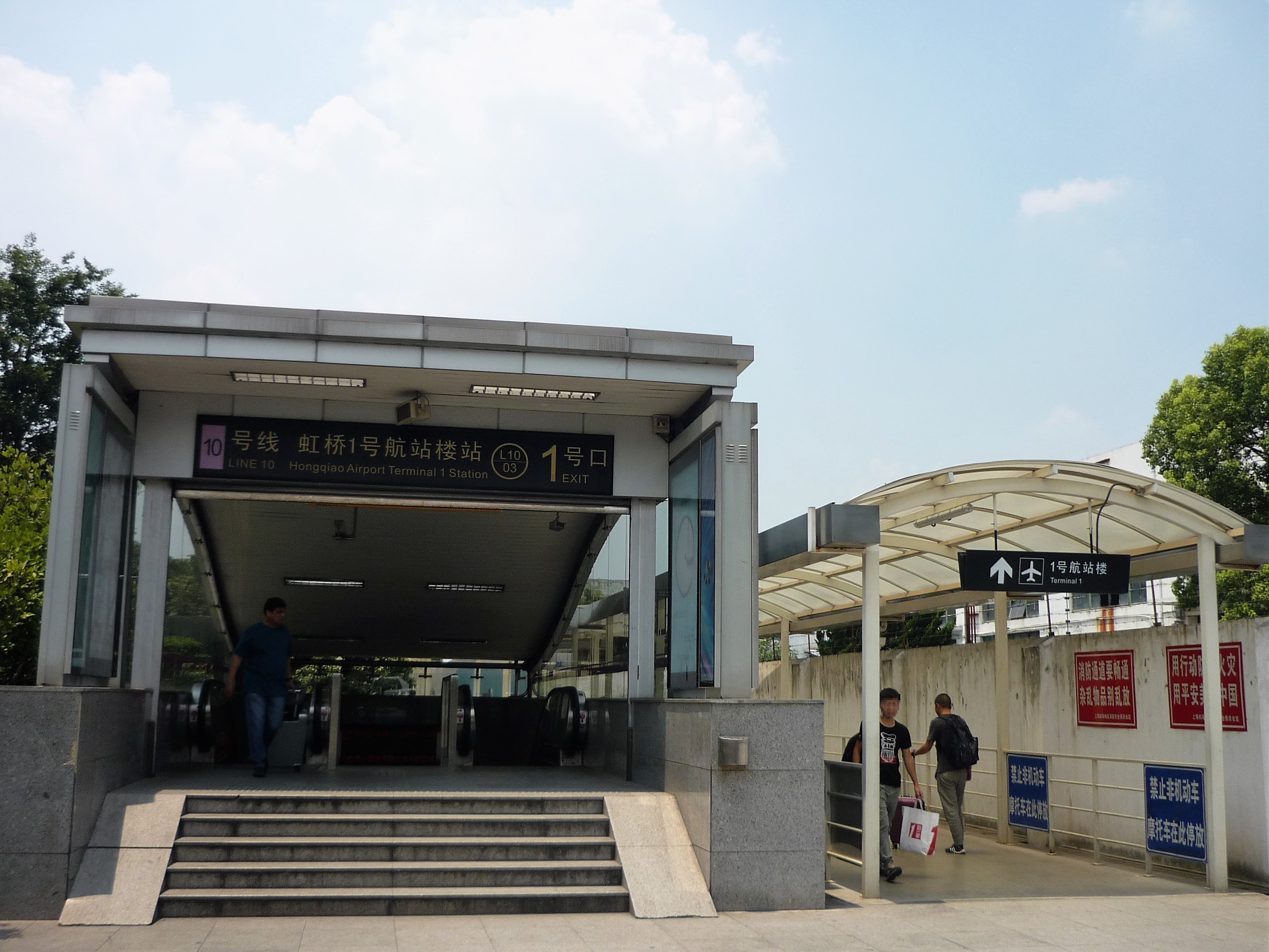 上海地铁 虹桥1号航站楼站1号口